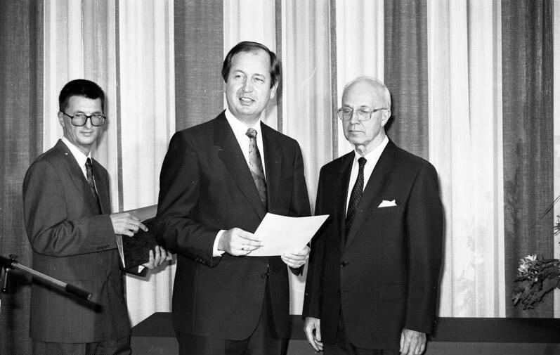 Bonn, 31.7.1991 Der Parlamentarische Staatssekretär beim Bundesminister der Finanzen, Manfred Carstens, gab anläßlich der Ernennung von Prof. Dr. Helmut Schlesinger zum Präsidenten der Deutschen Bundesbank und Dr. Hans Tietmeyer zum Vizepräsidenten der Deutschen Bundesbank einen Empfang im Bundesministerium der Finanzen.